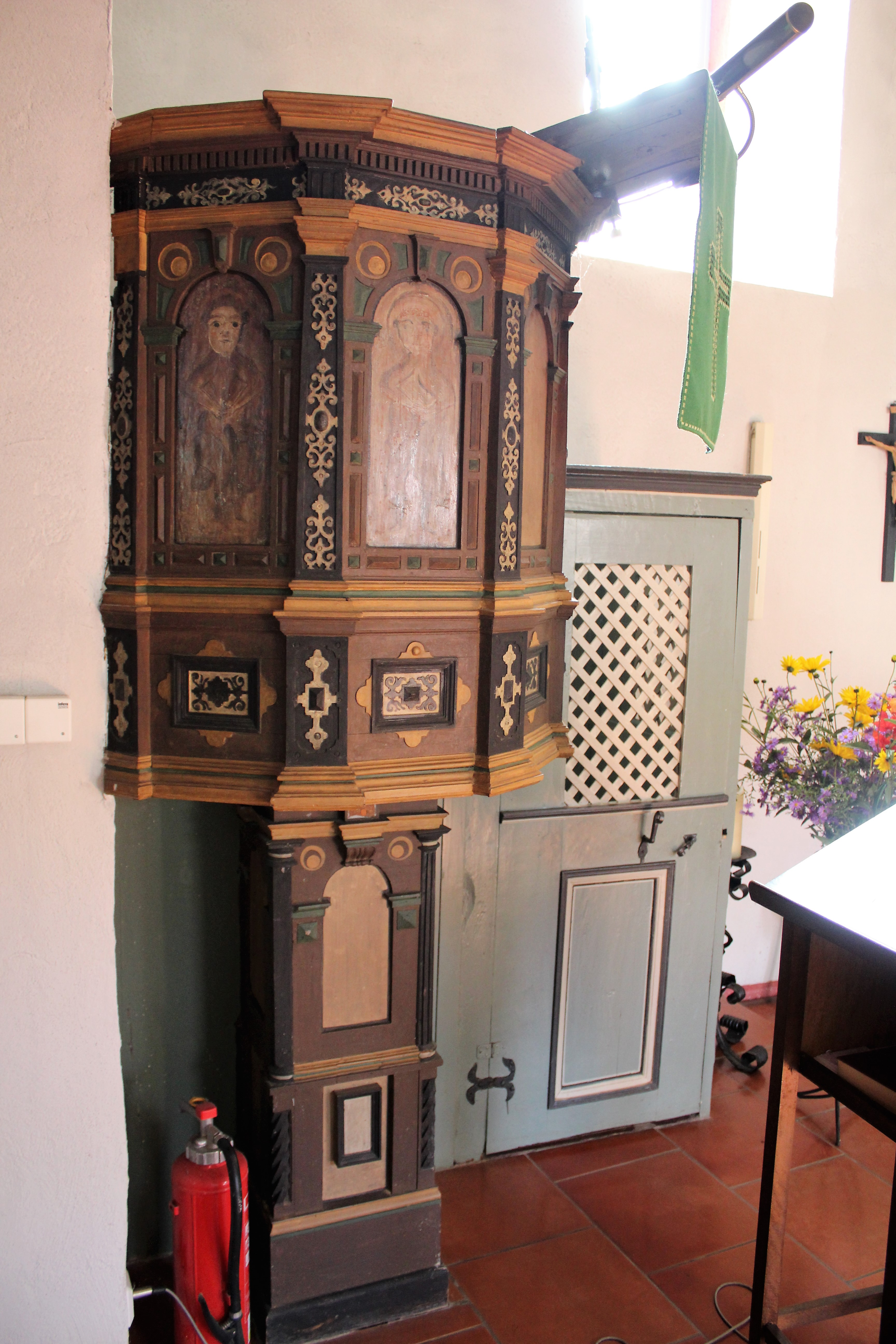 Evanglische Kirche Weipoltshausen, Gemeinde Lohra, Landkreis Marburg-Biedenkopf, Hessen, Deutschland